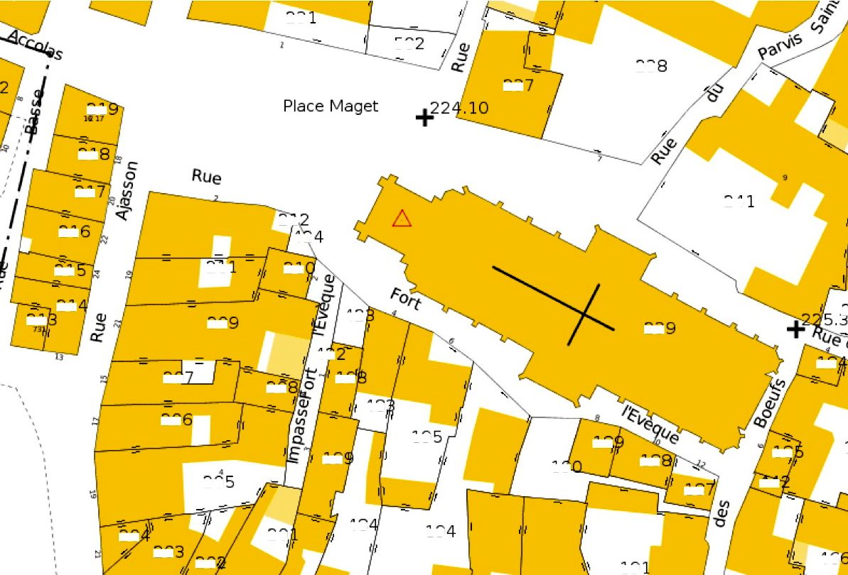 La Châtre, Église Saint Germain, extrait du cadastre actuel